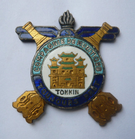 Insigne de la 3eme Compagnie de Munitions du Tonkin.